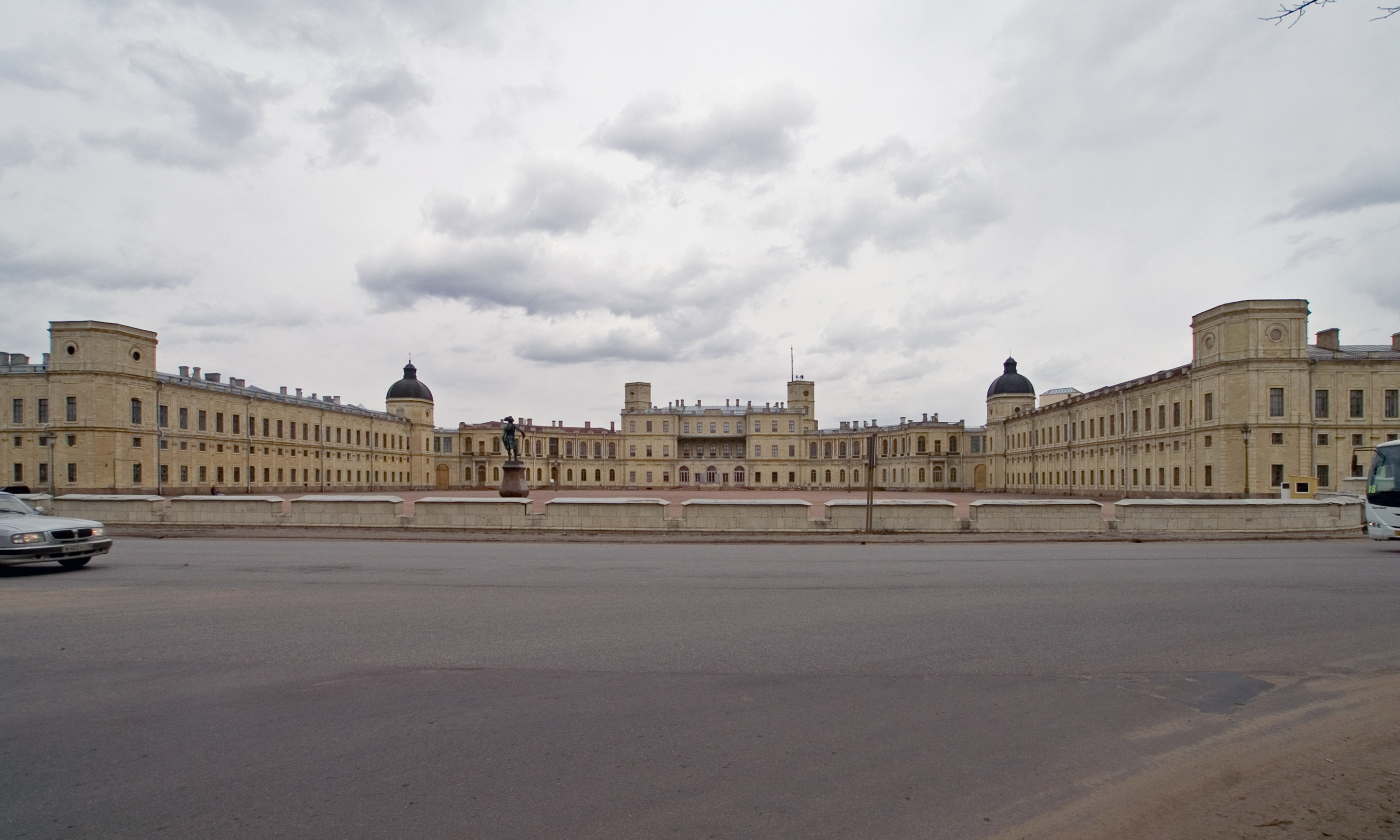 Ленинградская область, Гатчина, Гатчинский дворец